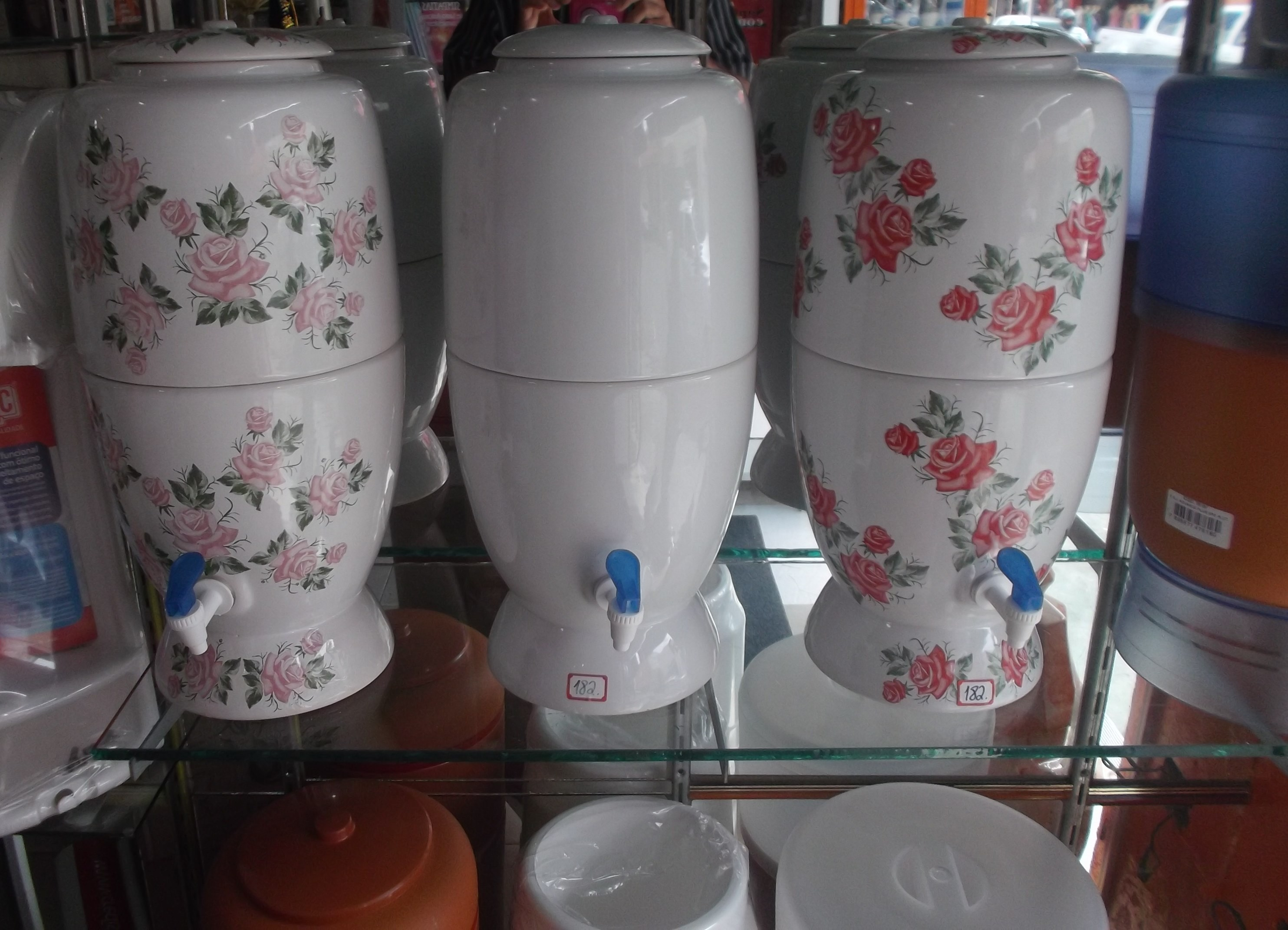 Filtros de água domésticos em uma loja de veder filtros em Teresina.